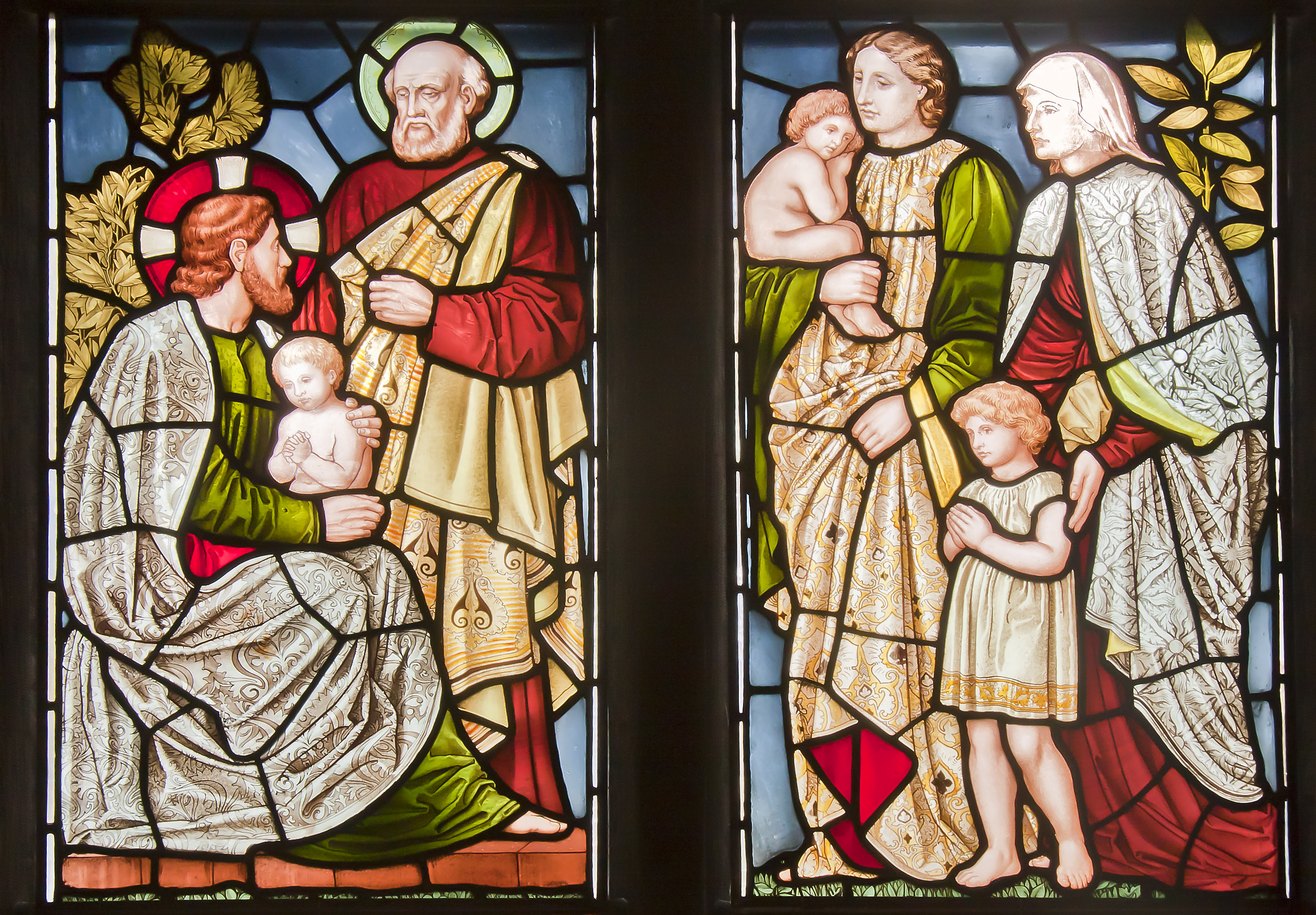 Kyrkfönster från 1800-talet i Nikolai kyrka i Örebro efter kartong av Carl Almquist. Motivet föreställer Jesus och barnen.